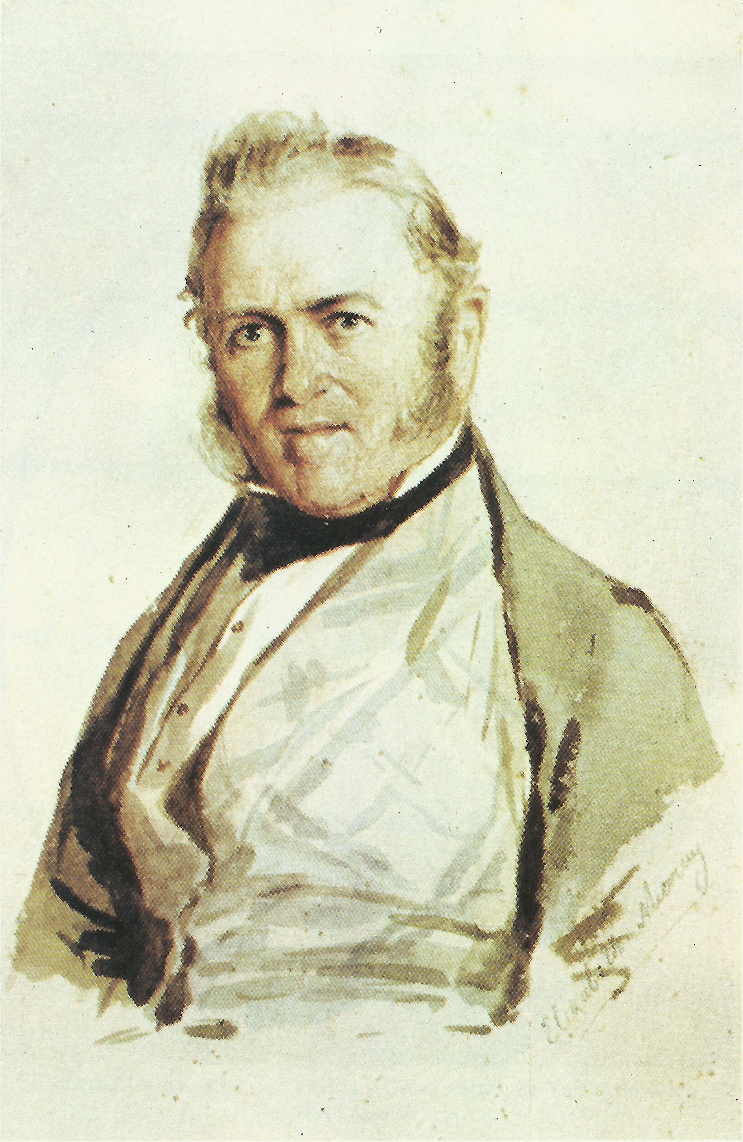 Retrato en acuarela de Alfred Diston elaborado por Elizabeth Murray en 1854.